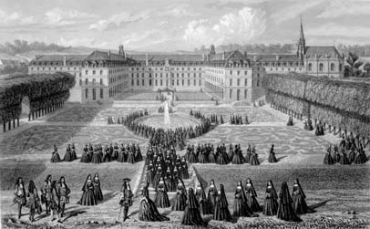 Le domaine de Saint-Cyr et les élèves de la Maison Royale de Saint-Louis. Gravure vers 1690, auteur inconnu.